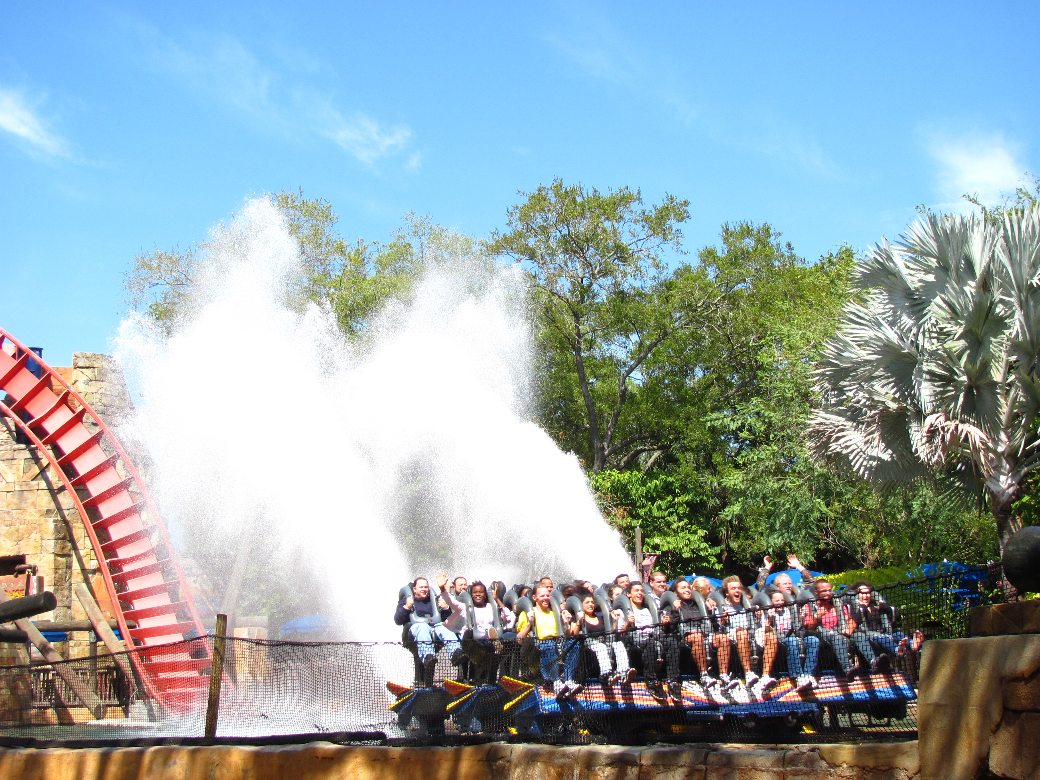 SheiKra